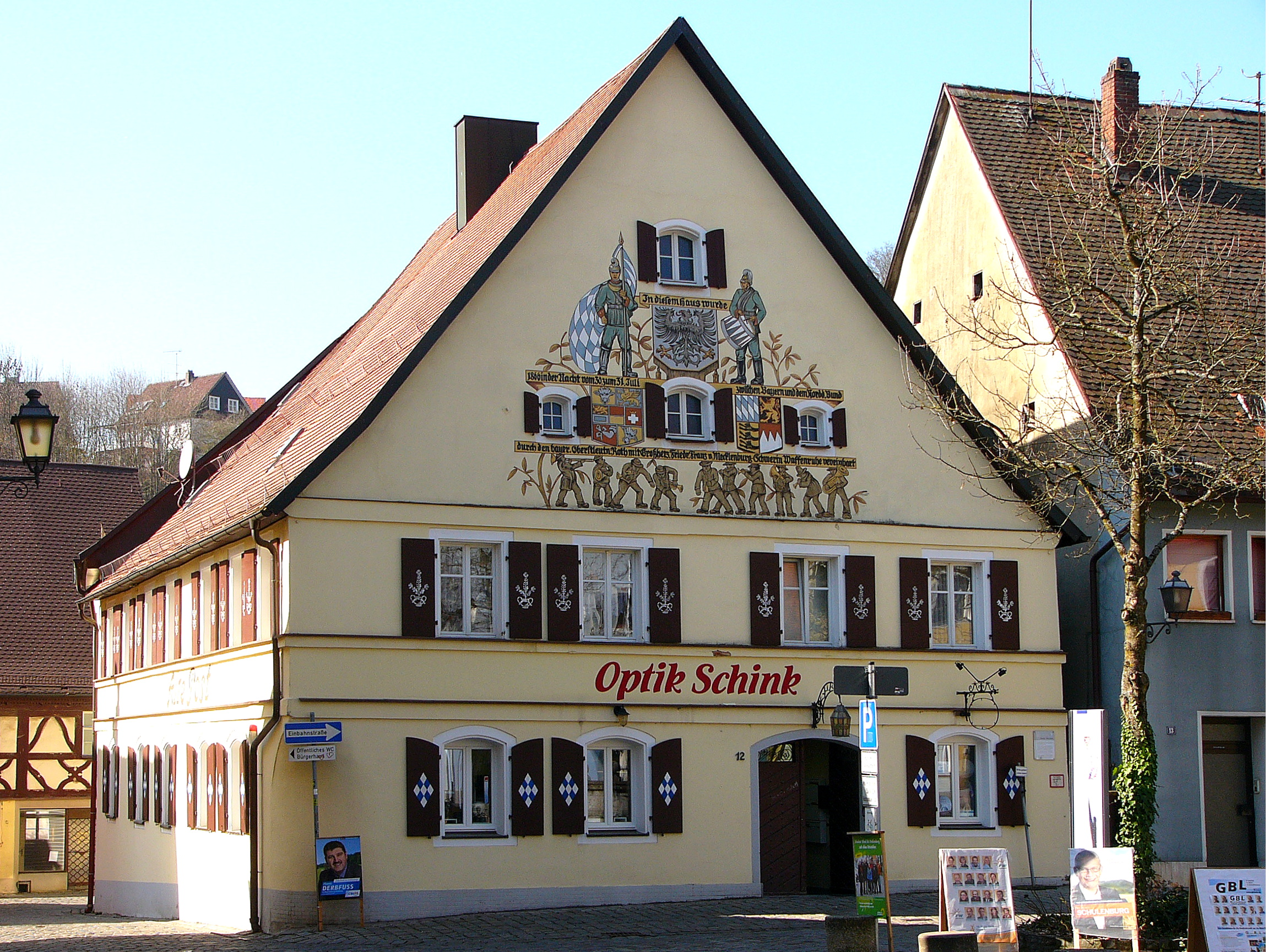 Ehemalige Posthalterei, dann Gasthof Zum Weißen Ross, später Hotel Alte Post; zweigeschossiges Satteldachhaus in Ecklage, massives Erdgeschoss, Fachwerkobergeschoss, verputzt, nach 1567, späterer Ausbau, im Giebelfeld Gemälde von Georg Prell von 1927.This is a photograph of an architectural monument.